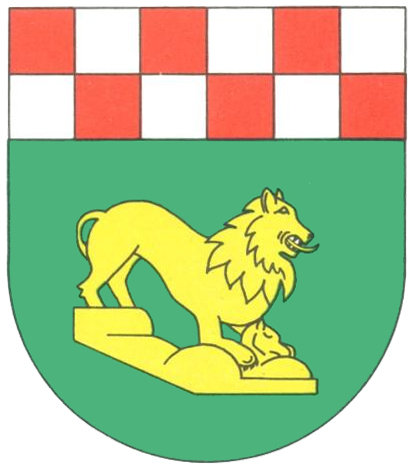 Wappen von Niederhambach